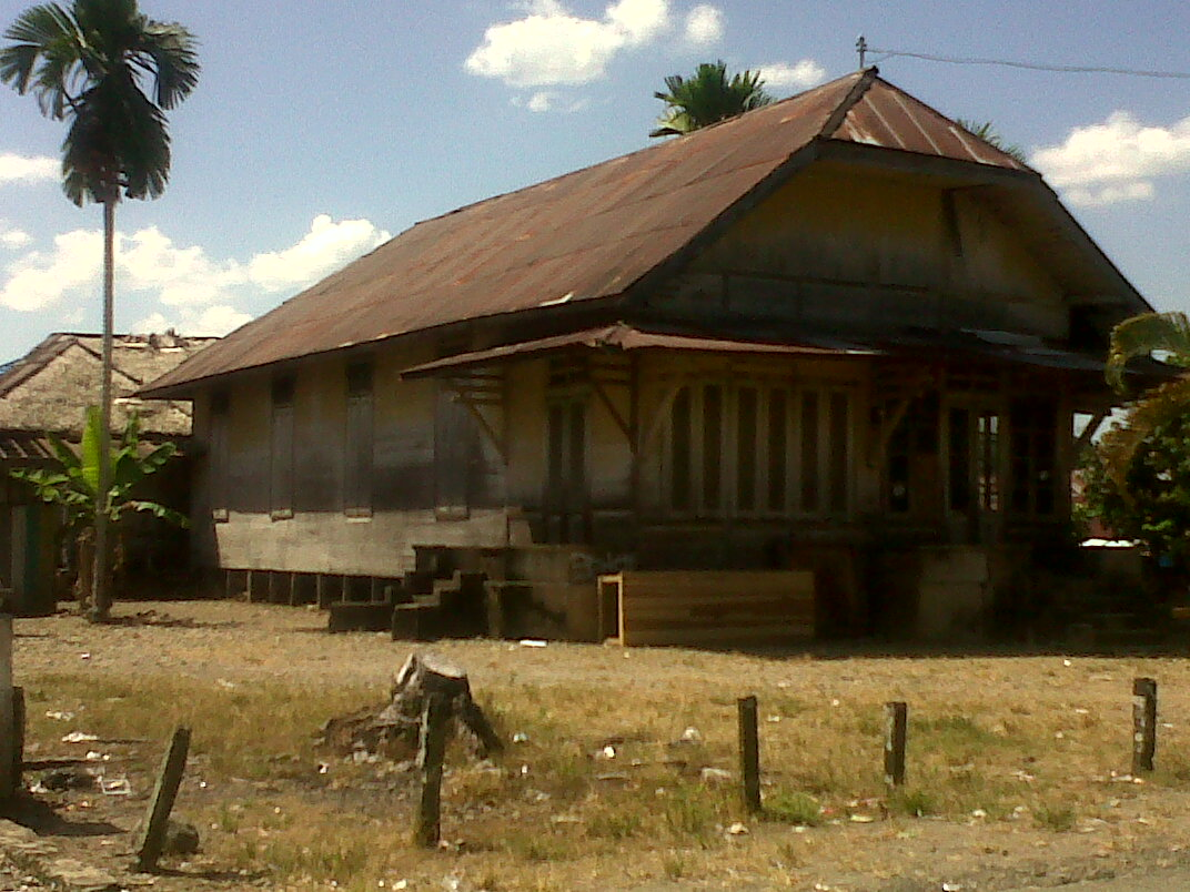 Rumah Gajah Manyusu di Birayang